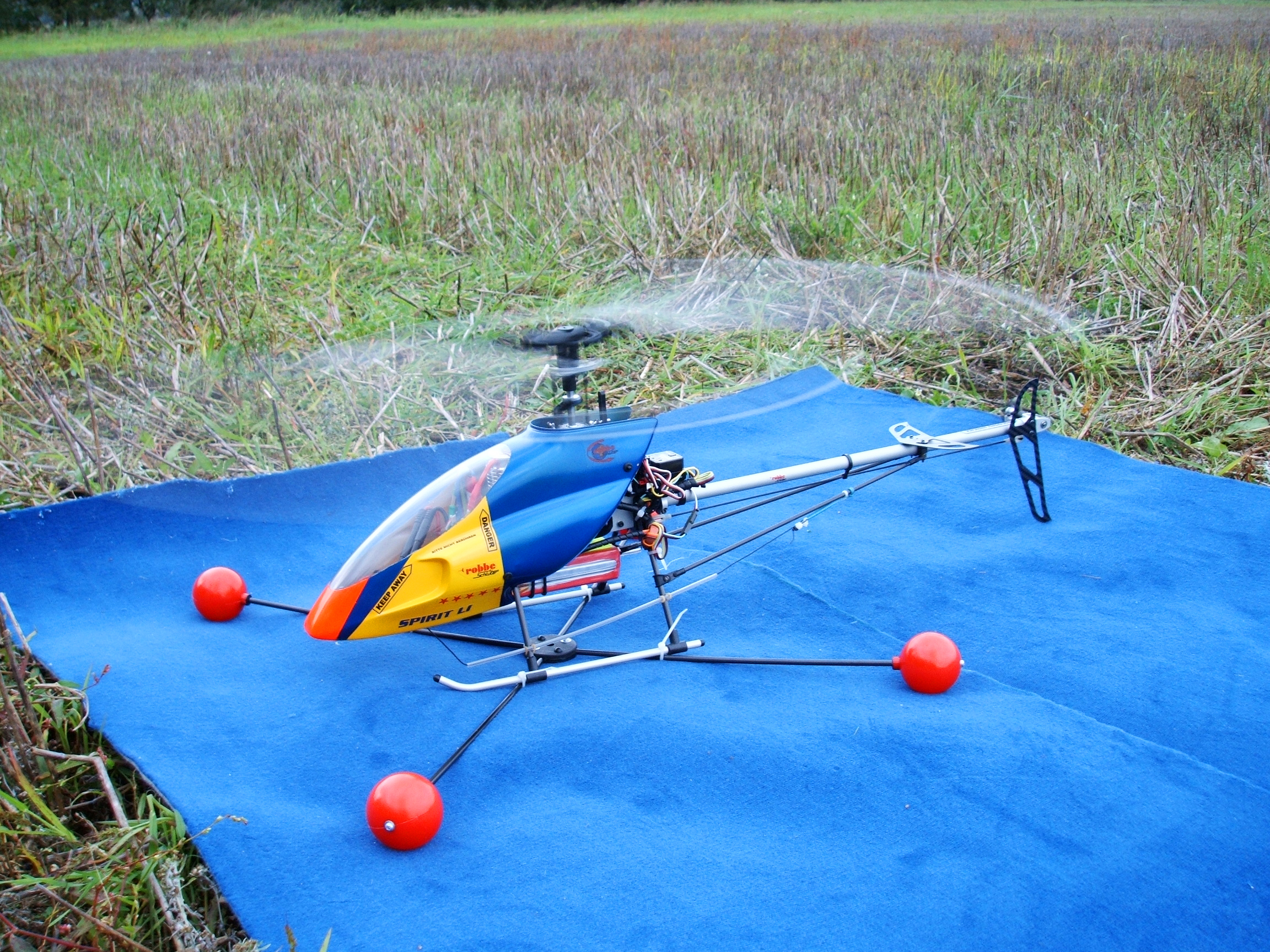 Ein Modellhubschrauber mit einem darunter montierten Trainingslandegestell kurz vor dem Abheben - RC-Helicopter with training frame